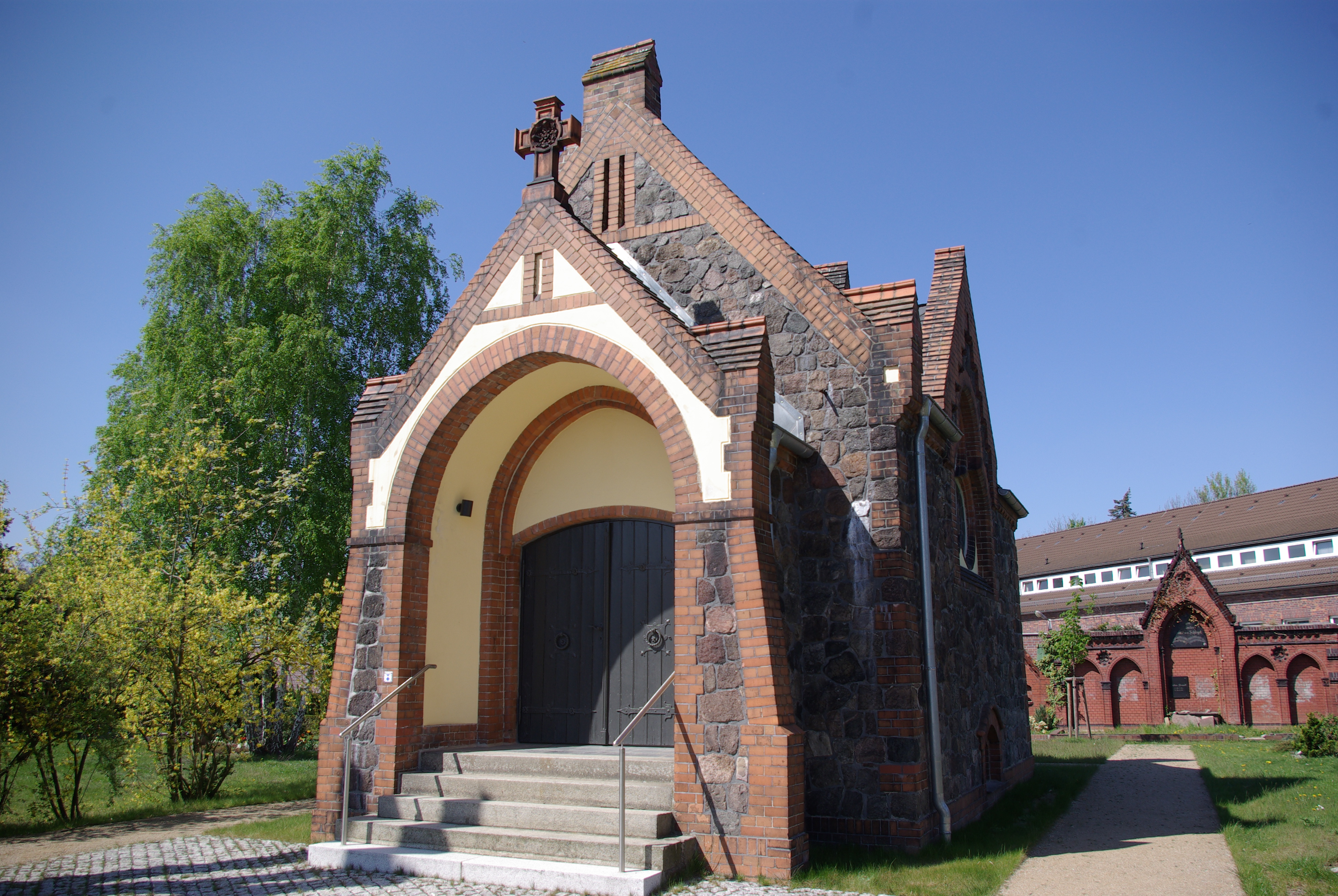 Schönefeld in Brandenburg. Die Friedhofkapelle auf dem Friedhof Schönefeld ist denkmalgeschützt.